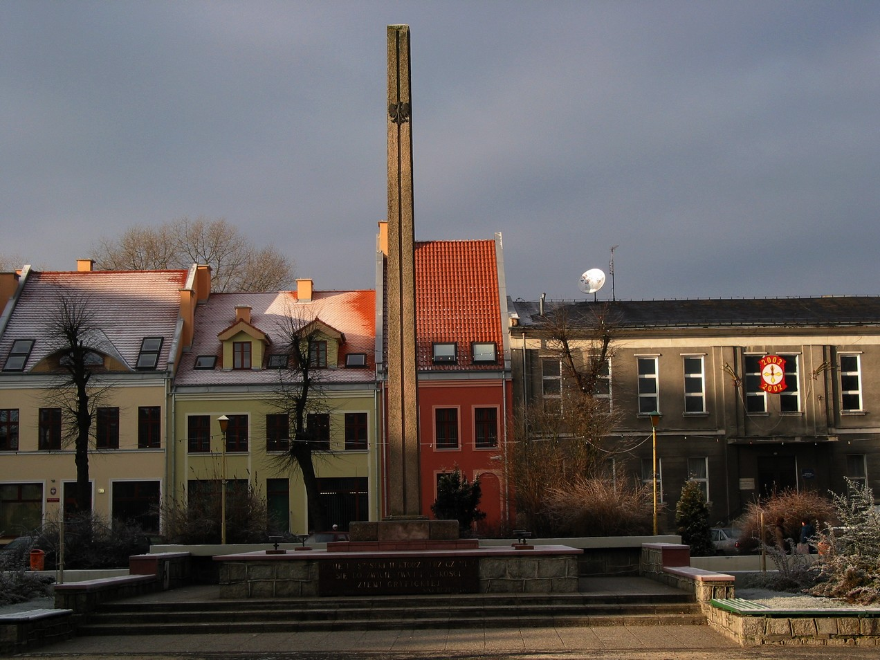 Pomnik "Pamięci wszystkich, którzy przyczynili się do zwycięstwa i polskości ziemi gryfickiej"